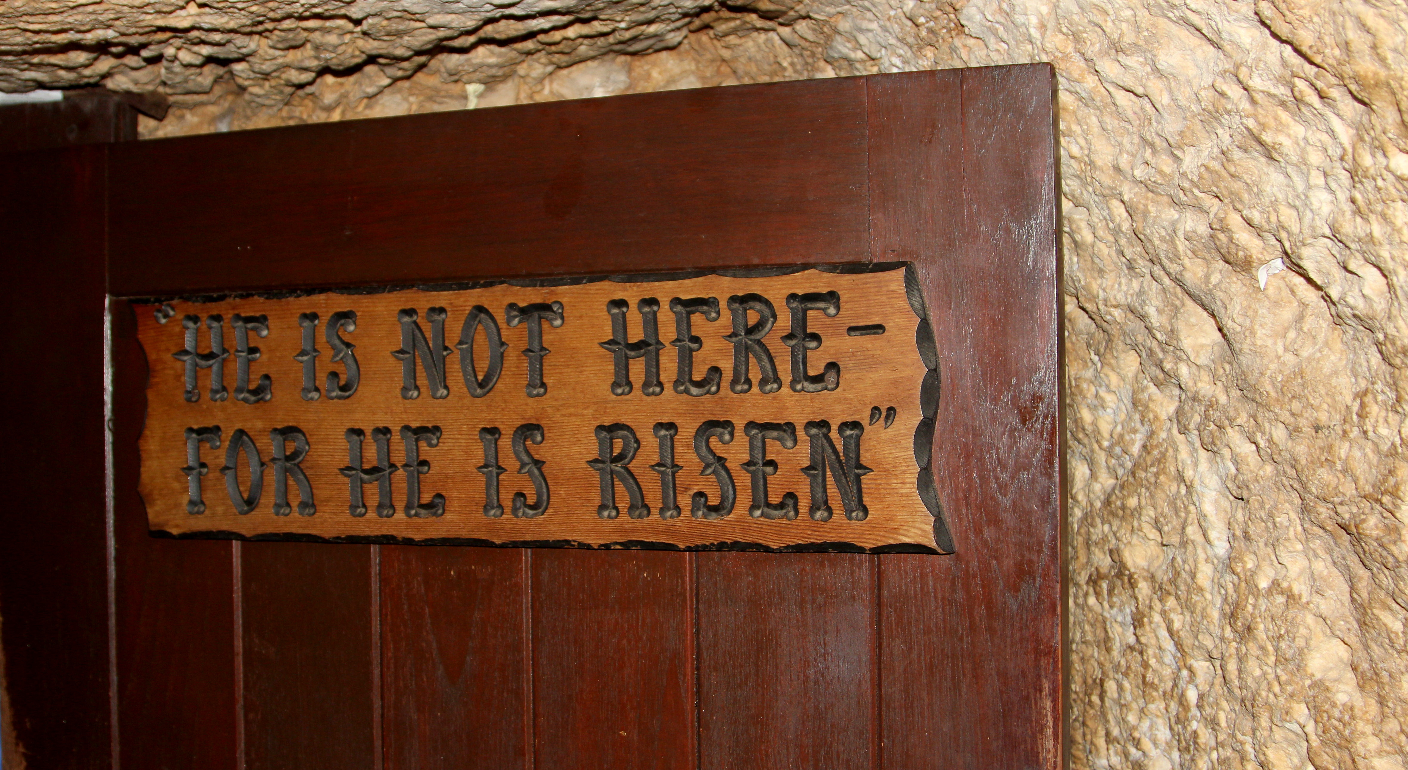 IMG_9391 Israel